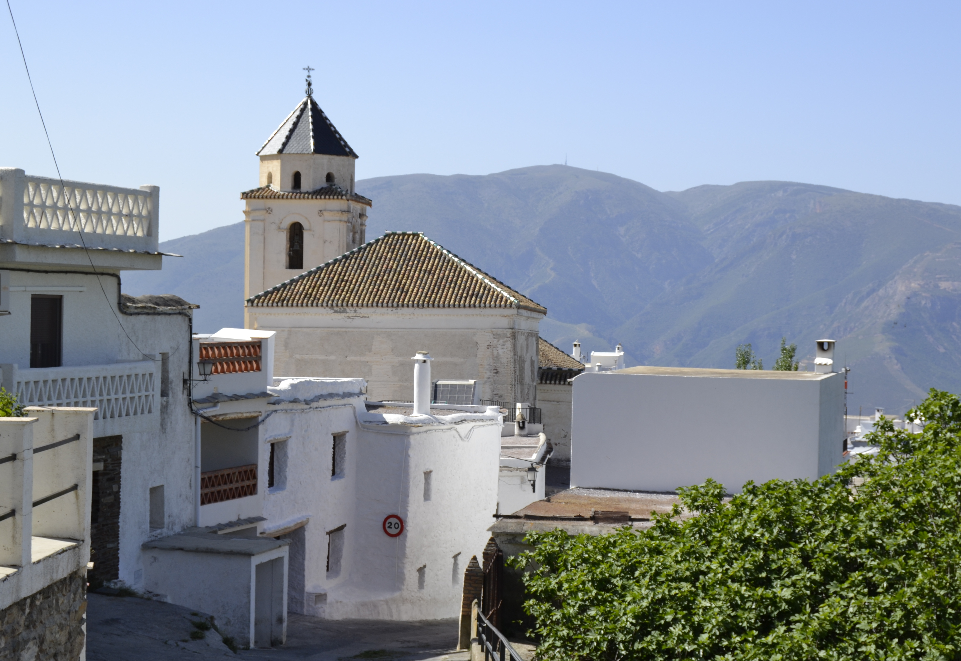 Cañar